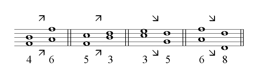 Description : Mouvement direct Source : Personnelle Licence : GFDL